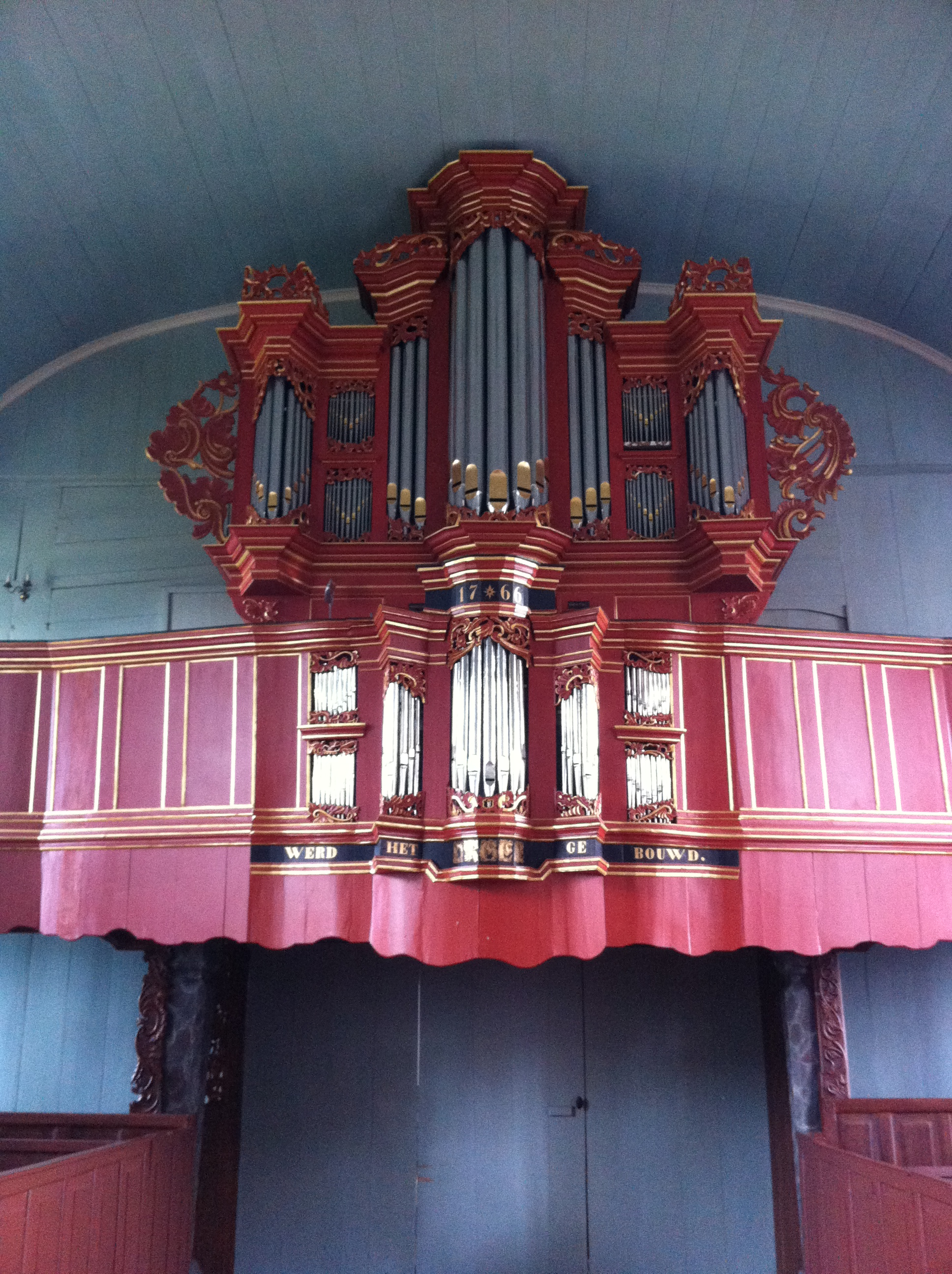 Orgel der Kirche in Midlum, Rheiderland, Landkreis Leer, Niedersachsen, Deutschland